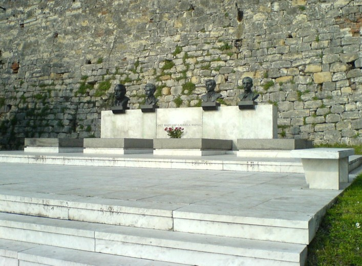 Grob narodnih heroja na Kalemegdanu.